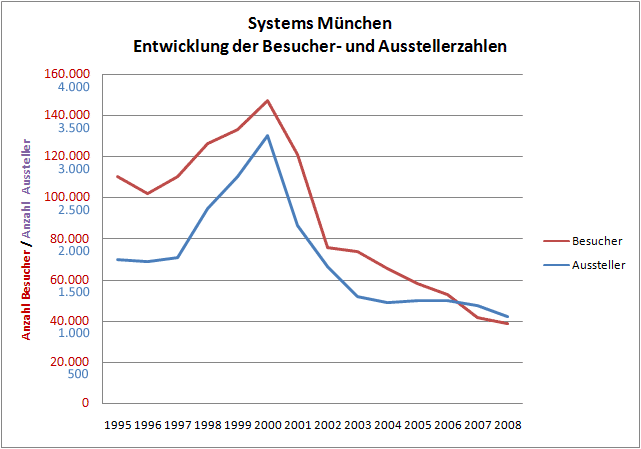 Diagramm der Entwicklung der Besucher- bzw. Ausstellerzahlen der Messe System von 1995 bis 2007